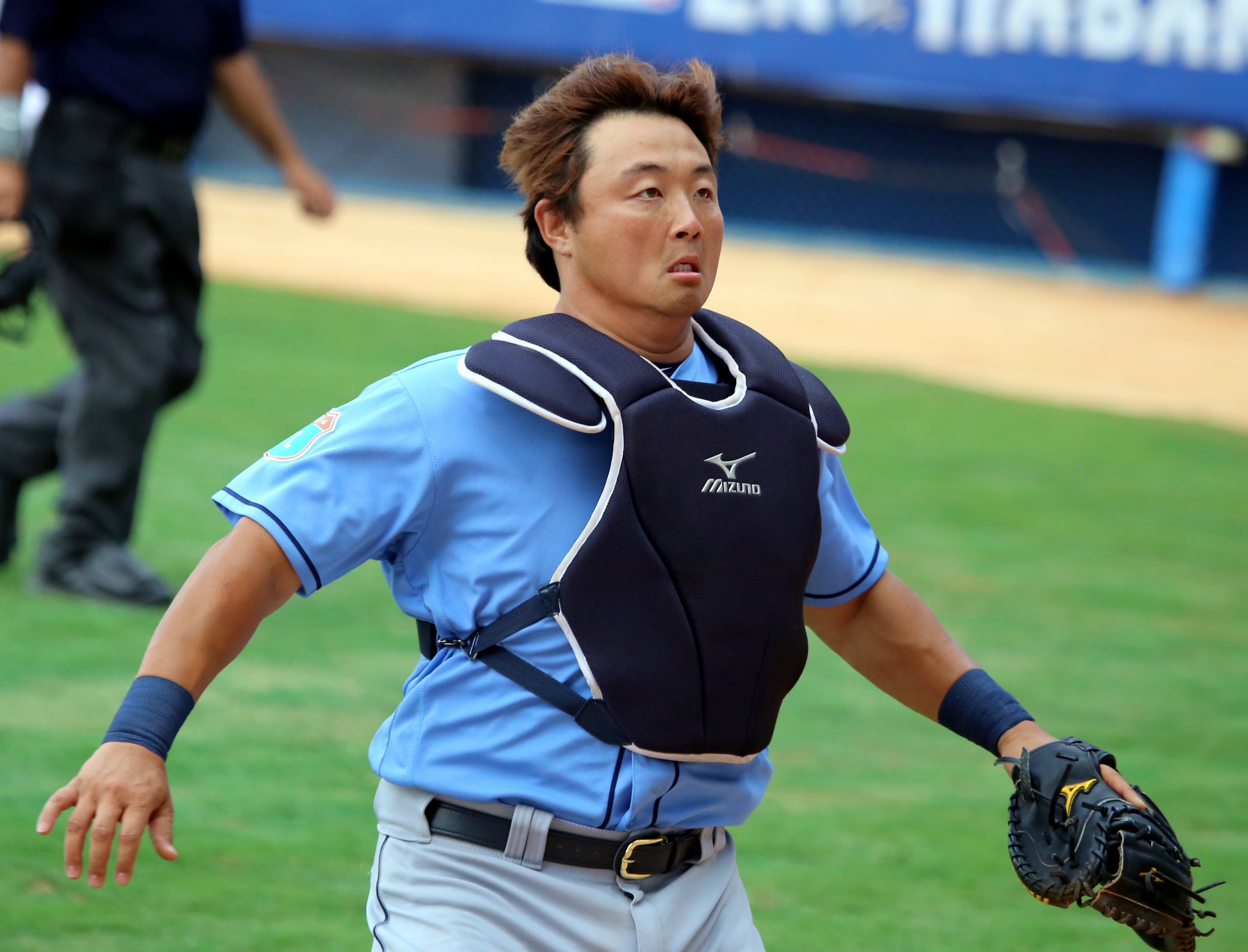 Hank Conger